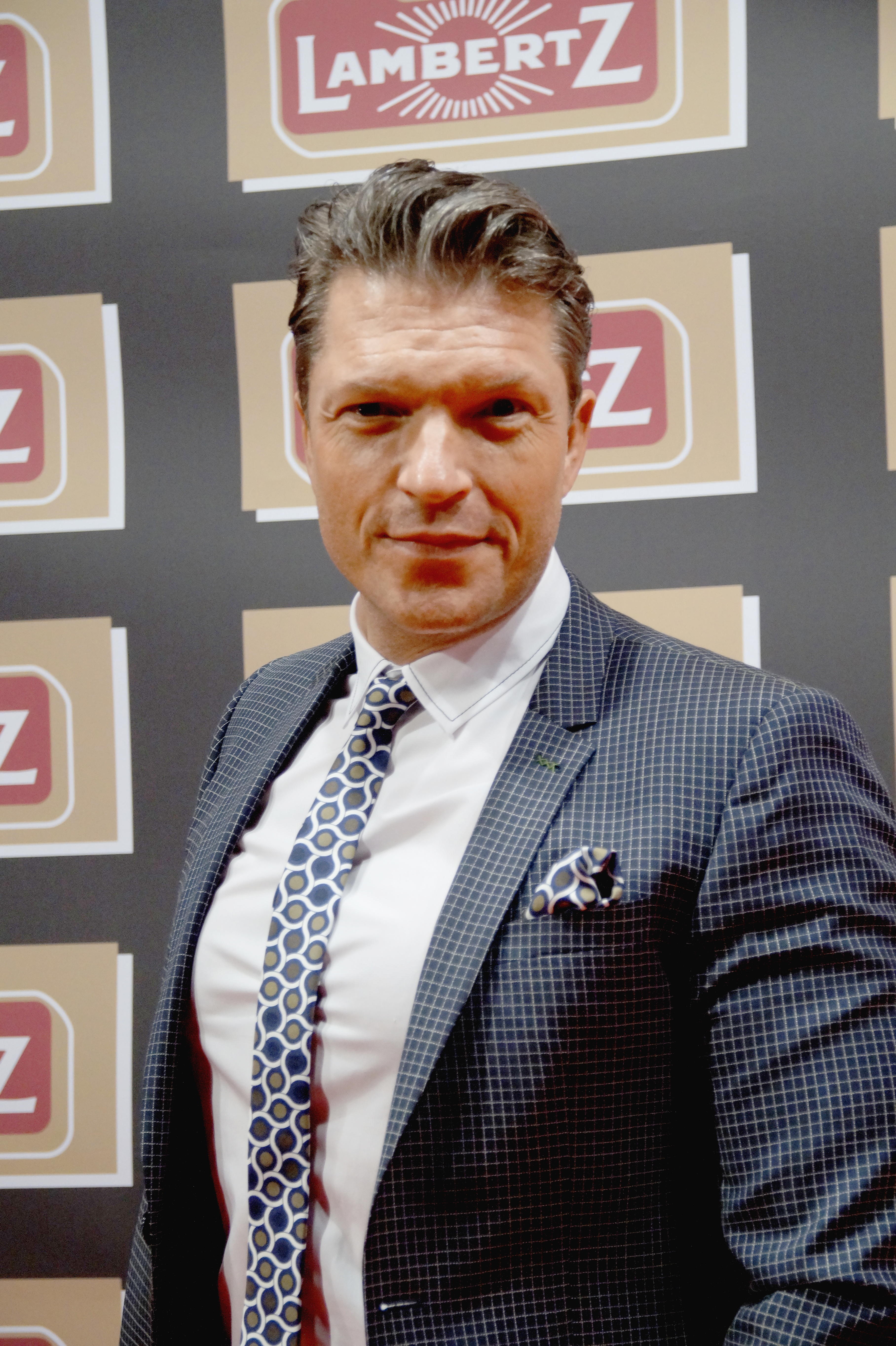 Hardy Krüger junior bei der Lambertz Monday Night, im Februar 2016.